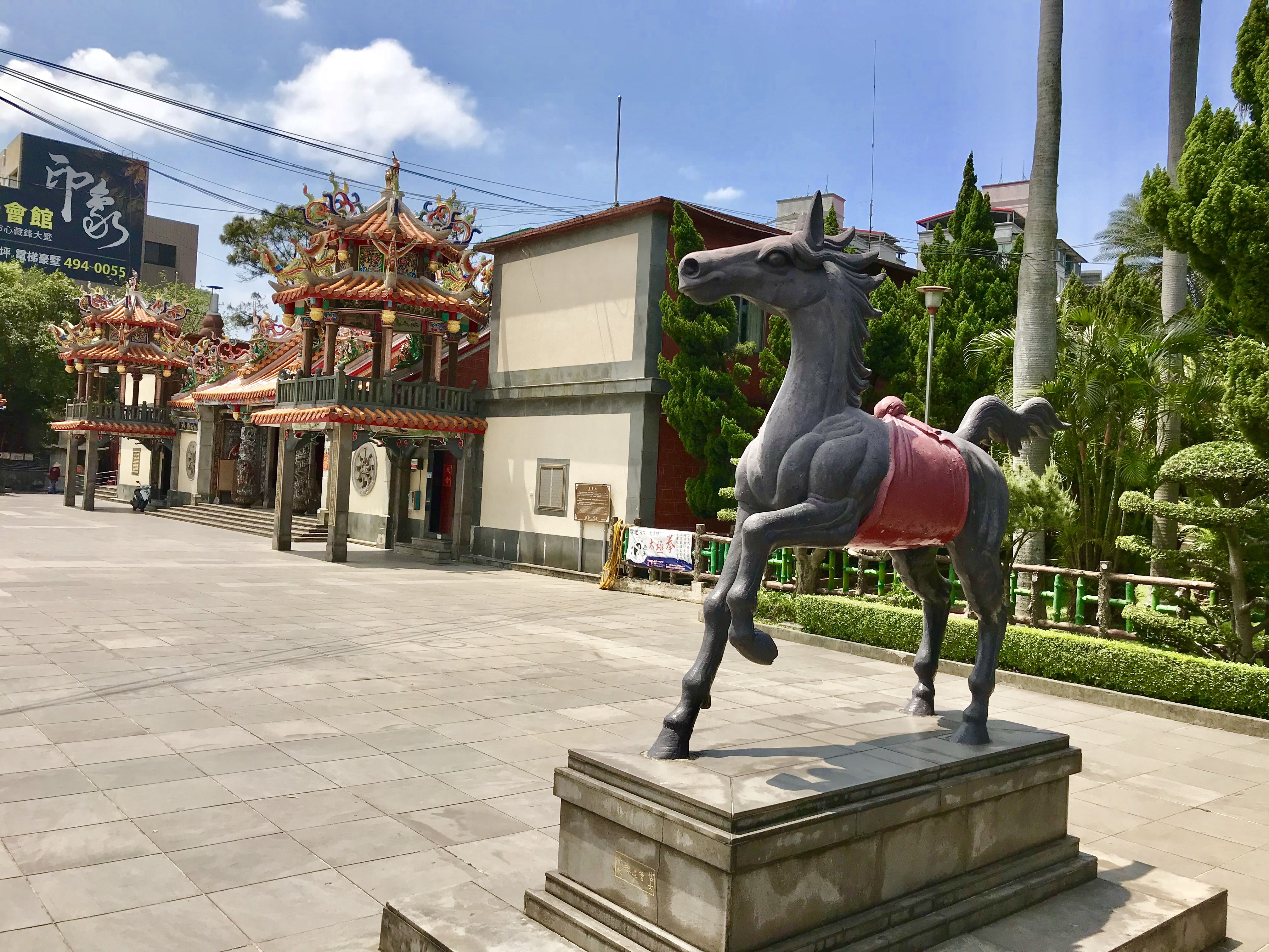 中文（台灣）: 平鎮褒忠祠與銅馬